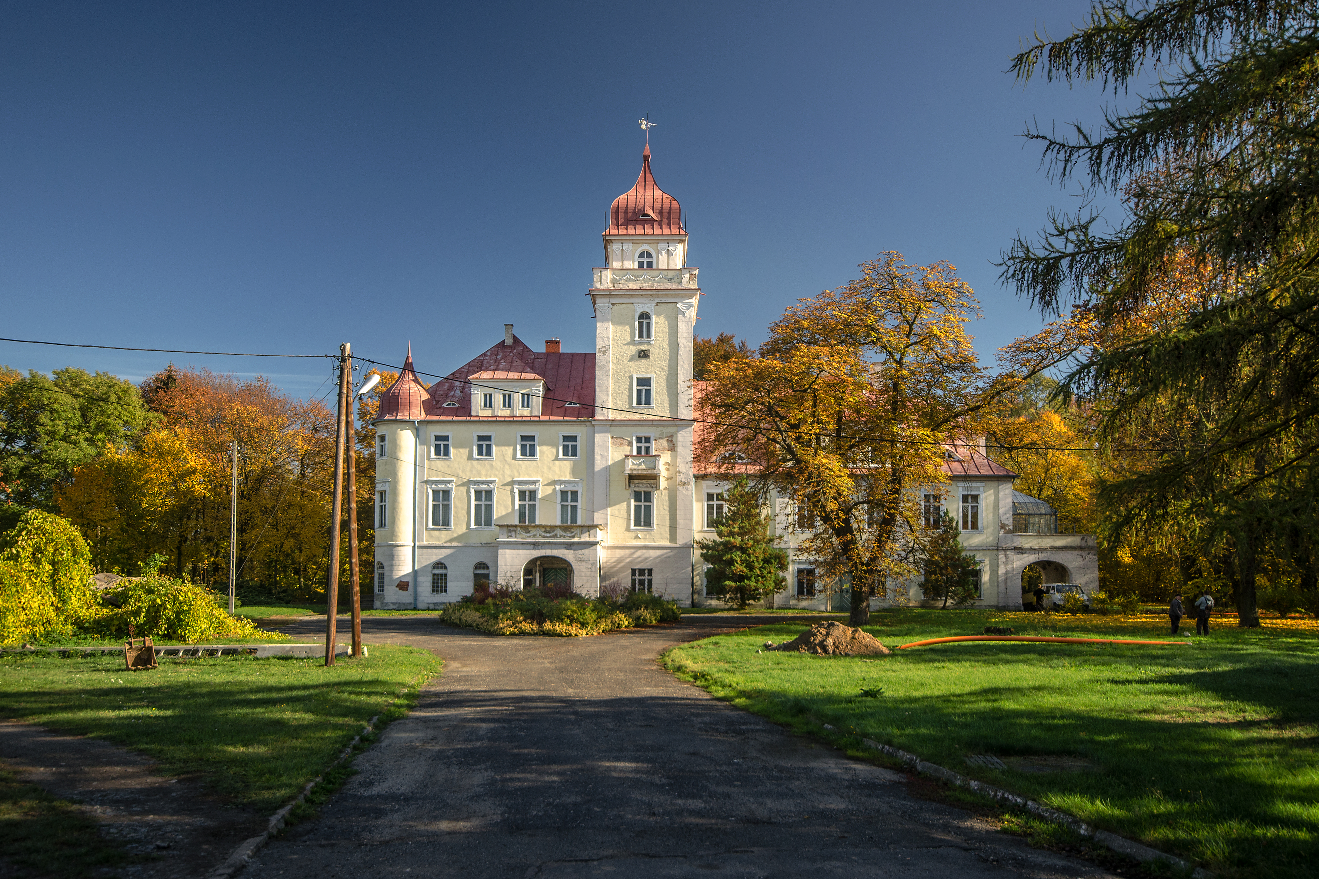 Dąbrówka Górna, pałac, 2 poł. XVII, XVIII, 1907